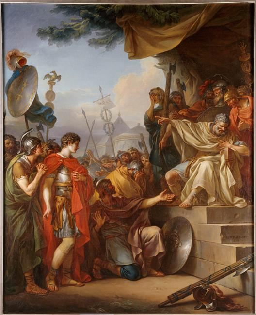 Manlius Torquatus condamnant son fils à mort pour s’être, malgré sa défense, engagé dans un combat singulier avant la bataille